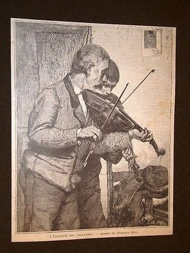 Dipinto di Domenico Ferri del 1886 ritraente due violinisti che suonano davanti la Chiesa della Madonna degli Angeli nella frazione di Villa Chiarini a Castel di Lama (AP) - Italia